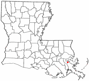 Volapük: Topam in tat: Louisiana.